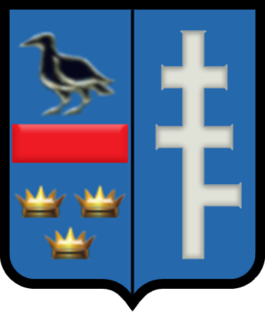 Історичний герб Городенки